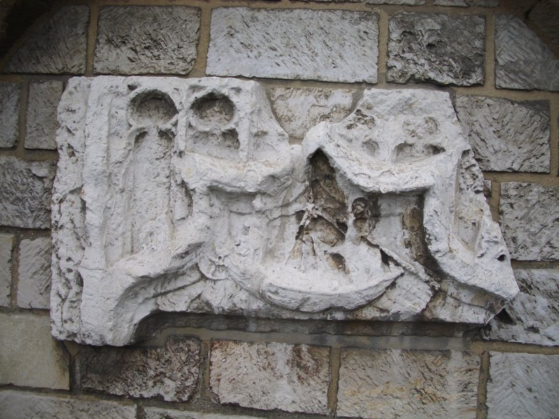 Bas-relief représentant le miracle de Saint Adjutor